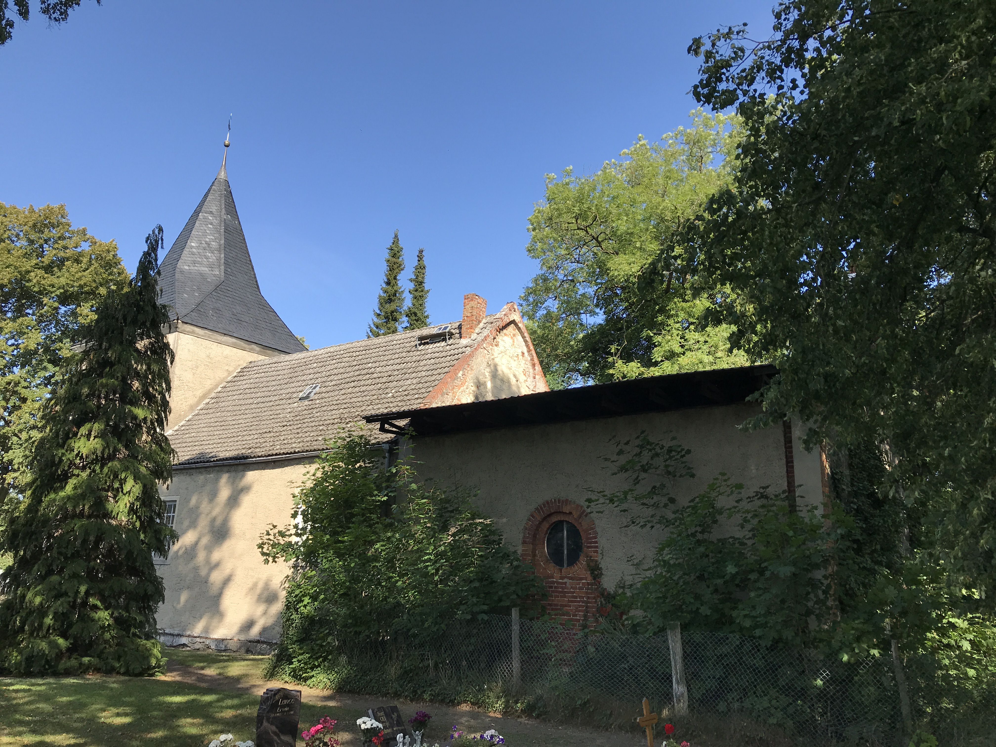 Die Kirche Groß Spiegelberg ist eine verputzte Feldsteinkirche in Groß Spiegelberg, einem Ortsteil der Gemeinde Jatznick im Landkreis Vorpommern-Greifswald in Mecklenburg-Vorpommern. Im Innern steht unter anderem ein Kanzelkorb aus dem 18. Jahrhundert.